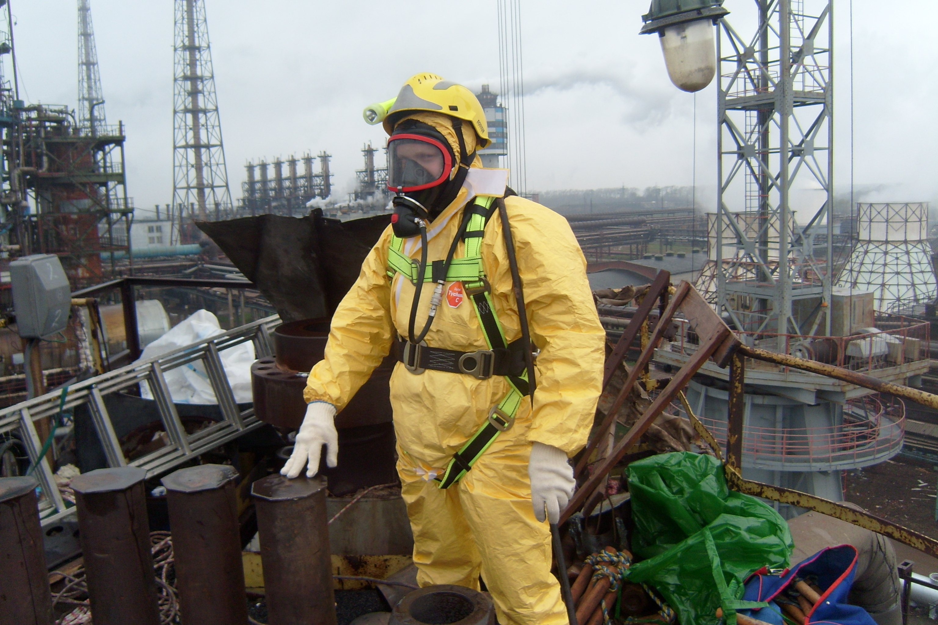 Газоспасатель на испытаниях